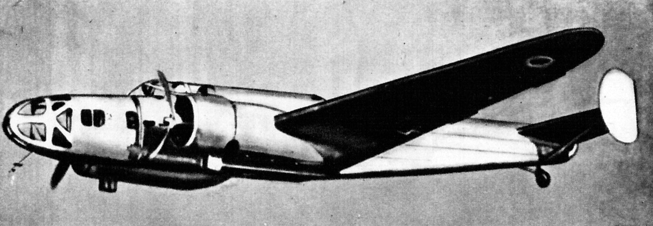 Francuski samolot bombowy Bloch MB.133.